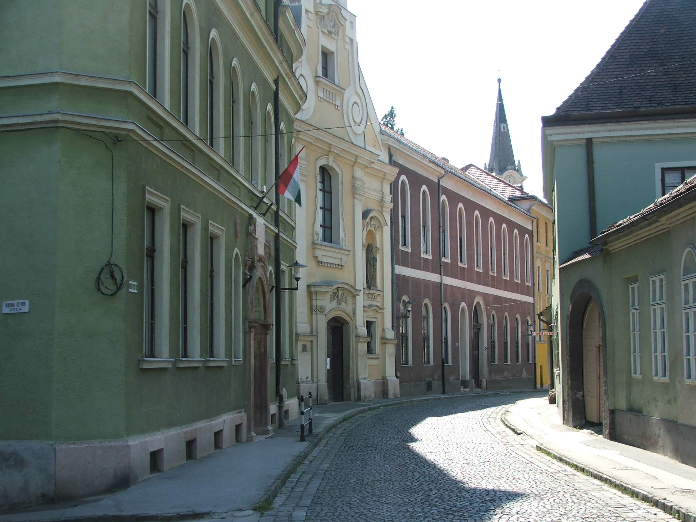 Watertown, Esztergom